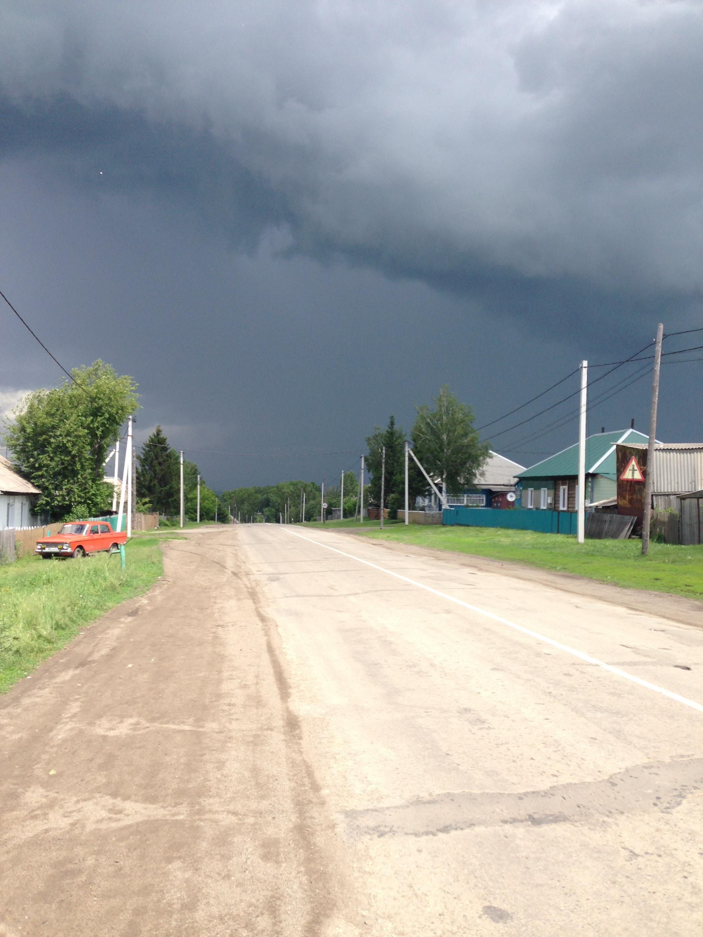 Улица Братьев Шутаковых